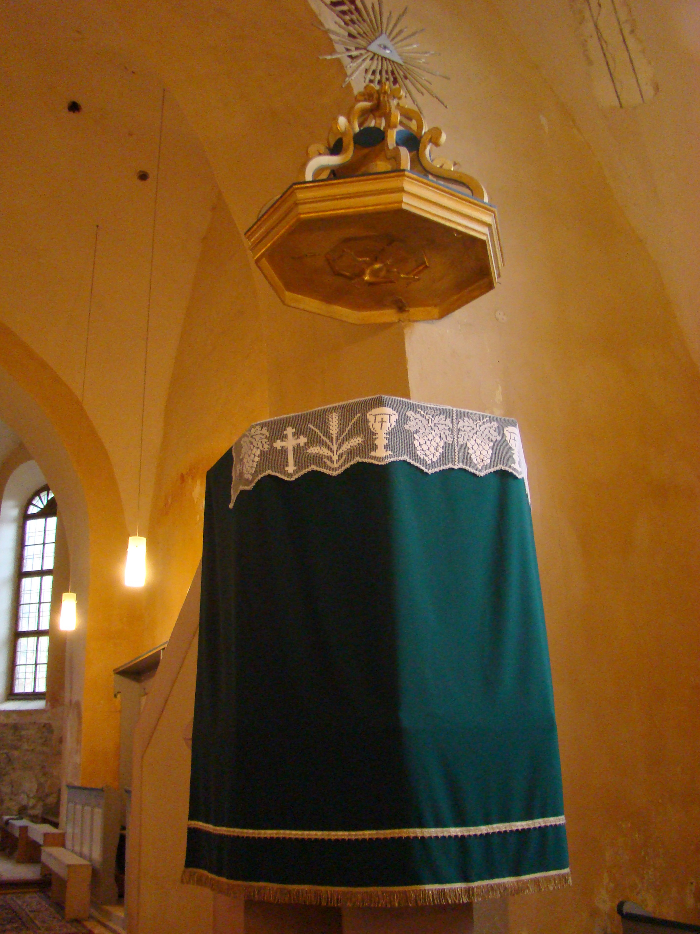 Biserica evanghelică fortificată, sat Agârbiciu; comuna Axente Sever, județul Sibiu 01